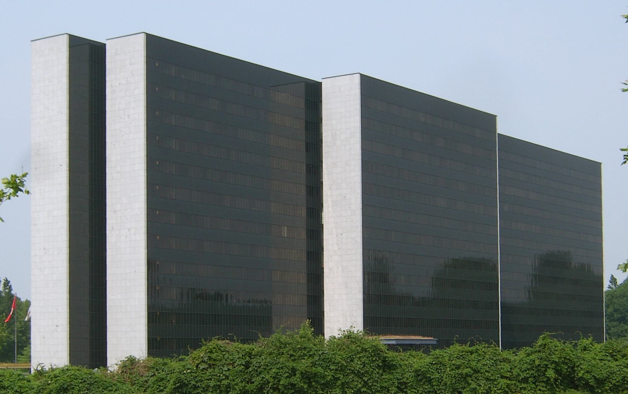 Hauptverwaltung der Hamburgischen Electricitätswerke (heute: Vattenfall Europe) in Winterhude.